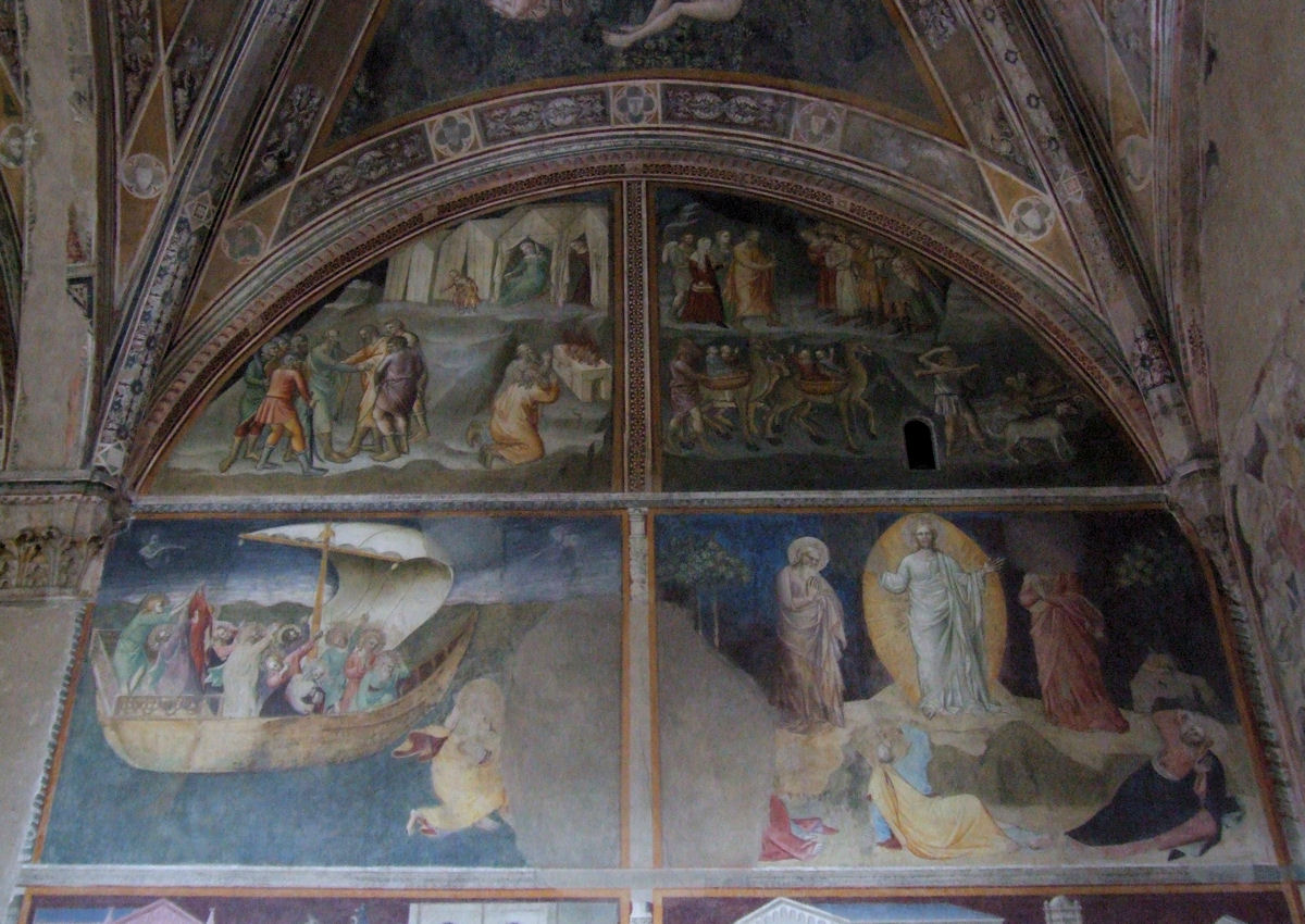 Chiesa San Antonio Abate del Tau, Pistoia, Italy